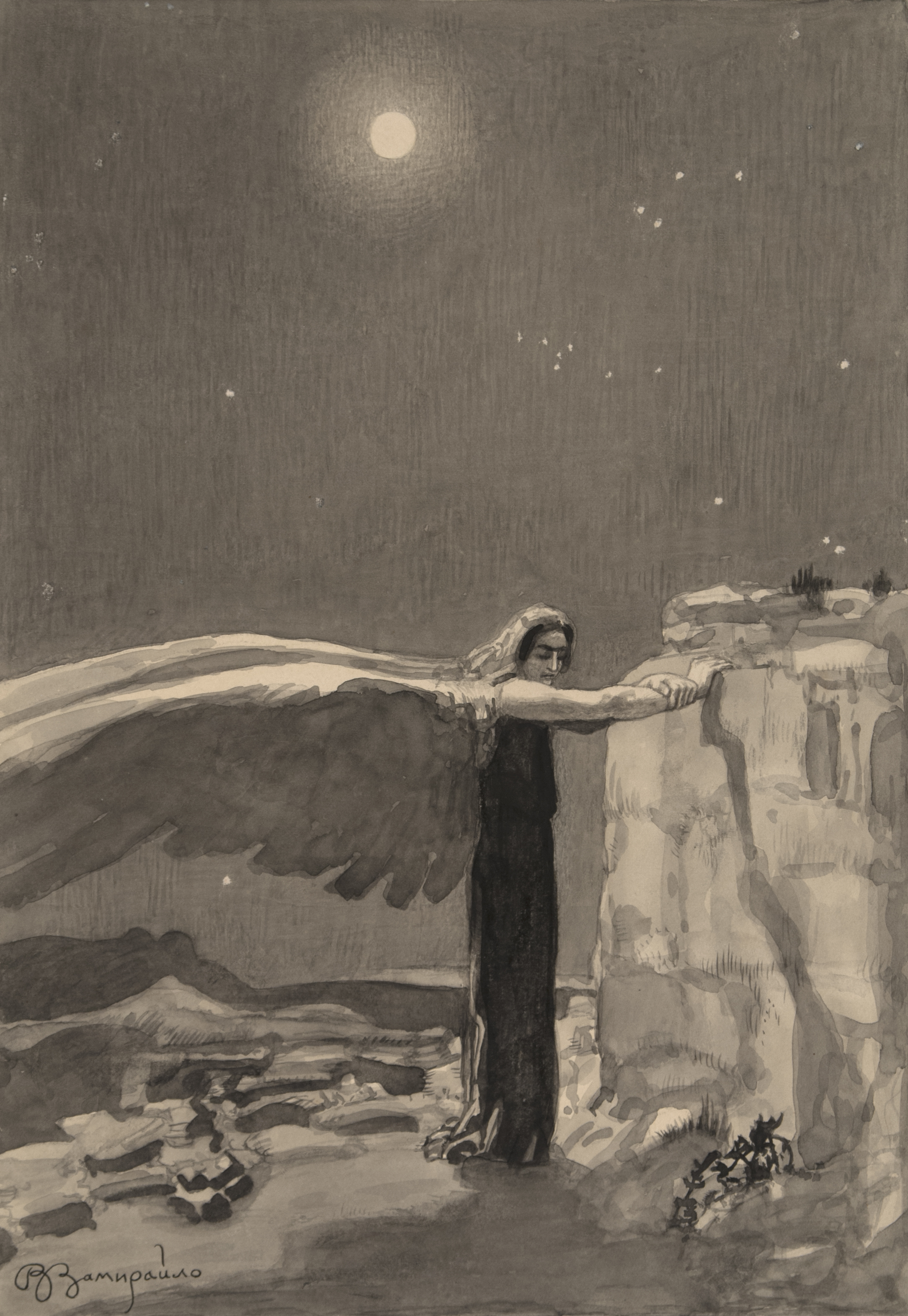 Illustrazione di Viktor Zamirajlo (1868-1939) per il poema "Il Demone" di Michail Lermontov